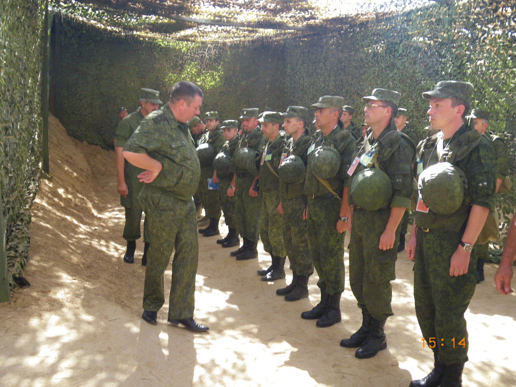 Строевой смотр, Кавказ -2012